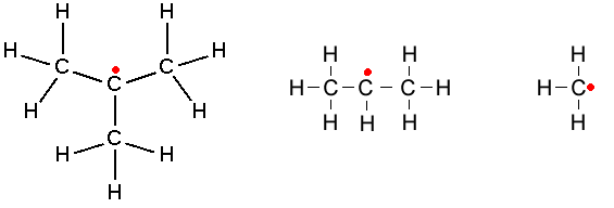 prim, sec en tert alkylgroepen nieuwere versie